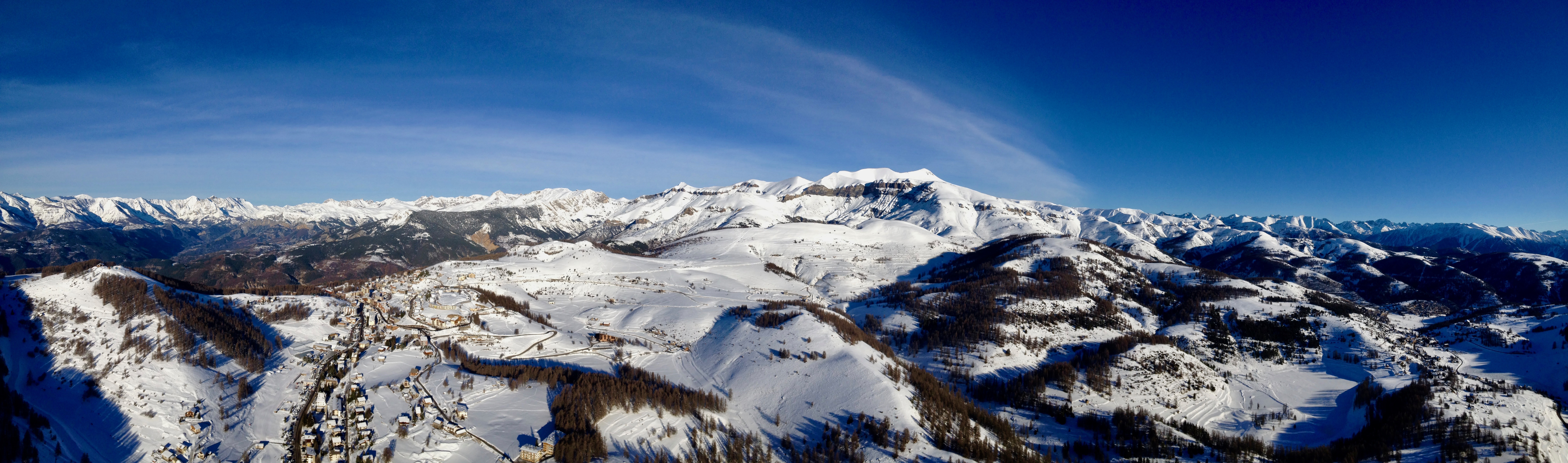 Mont Mounier vue depuis une montgolfière en hiver